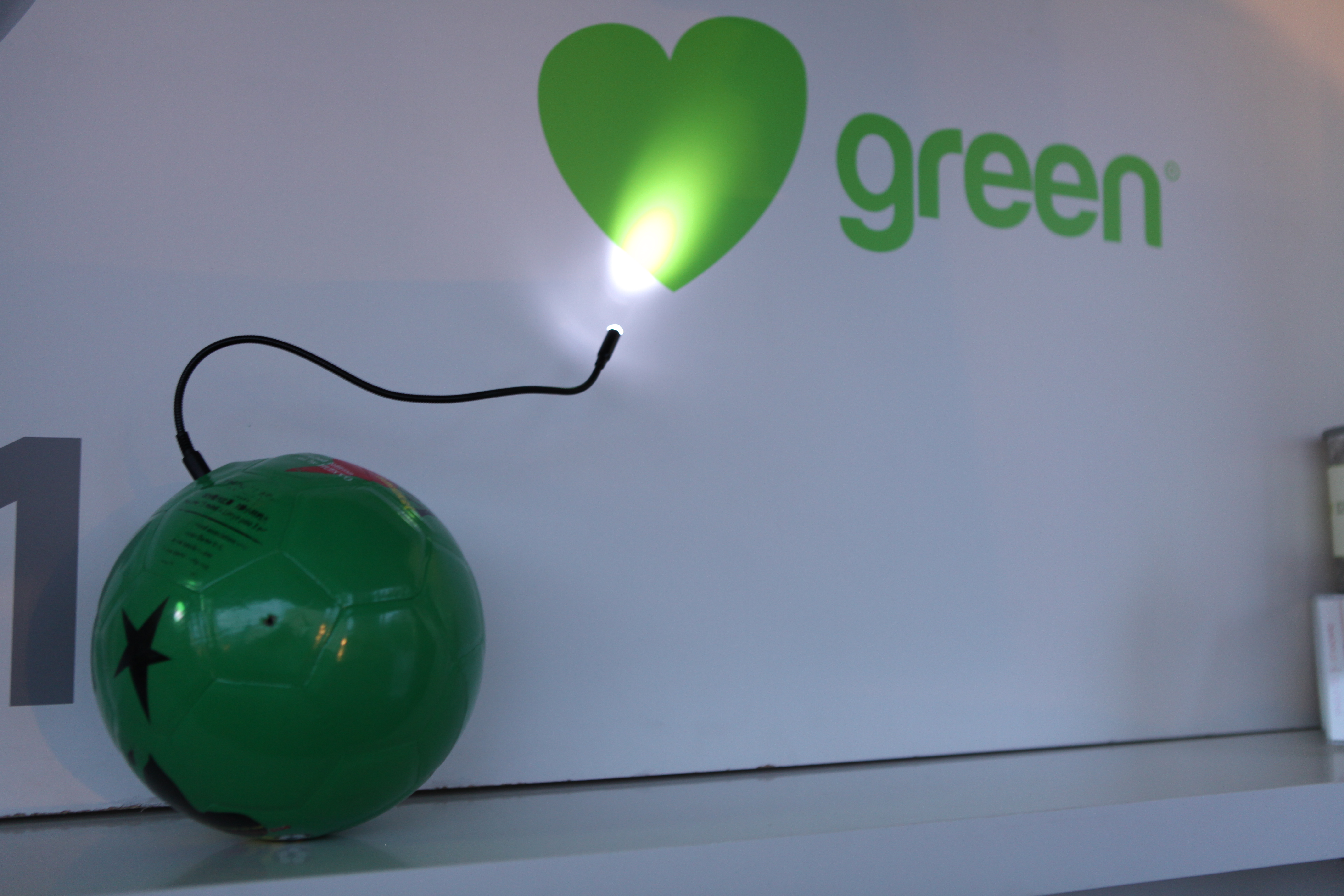 Der "Soccket"-Ball gibt nach 15 Minuten kicken 3 Stunden Licht. Eine Innovation für Kinder in der 3. Welt